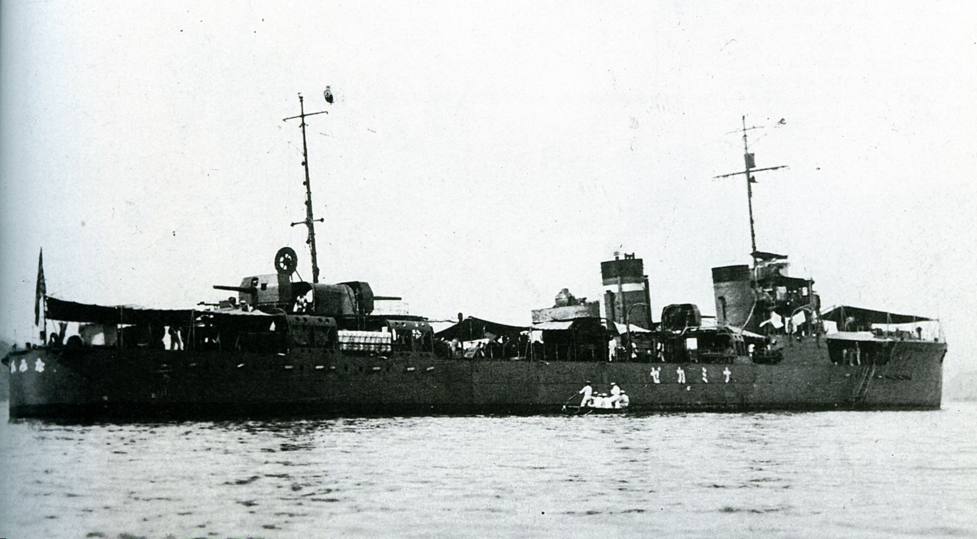 Imperial Japanese Navy destroyer Namikaze, circa 1925